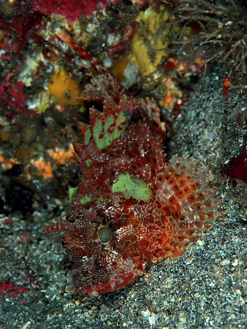 コクチフサカサゴ Scorpaena miostoma